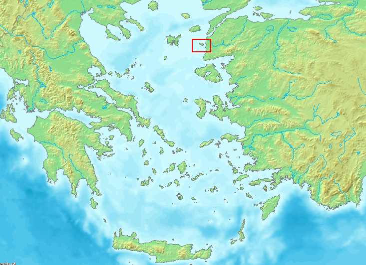 Tenedos